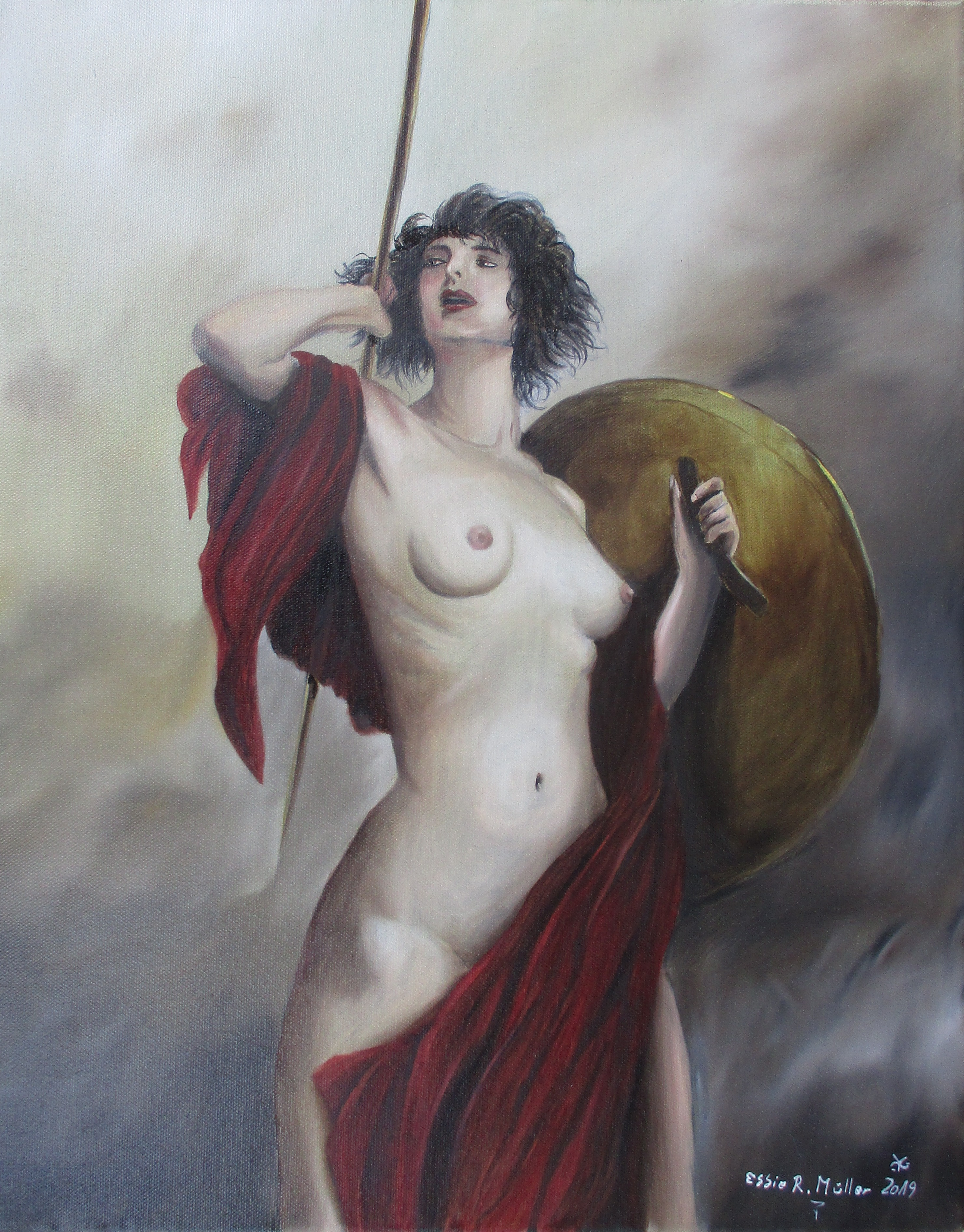 Werk, bei einem Kurs von Michael Maschka entstanden